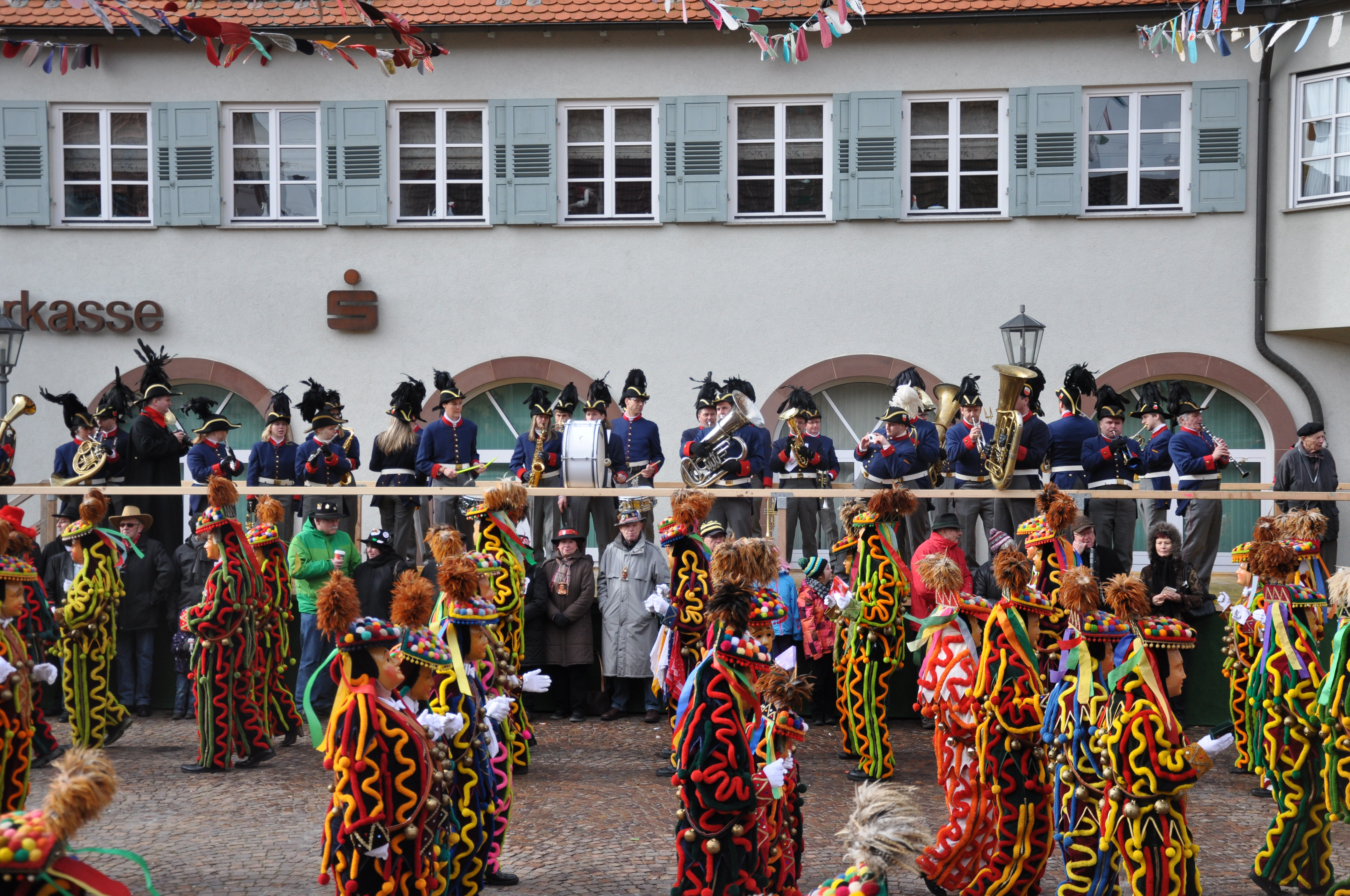 Schömberg (Zollernalbkreis), Narrentanz „Da Bolanes“ (Polonaise) der Narrenzunft Schömberg am Fasnetsmontag morgen (ab 10.31 Uhr), Fransenkleidle und Stadtkapelle